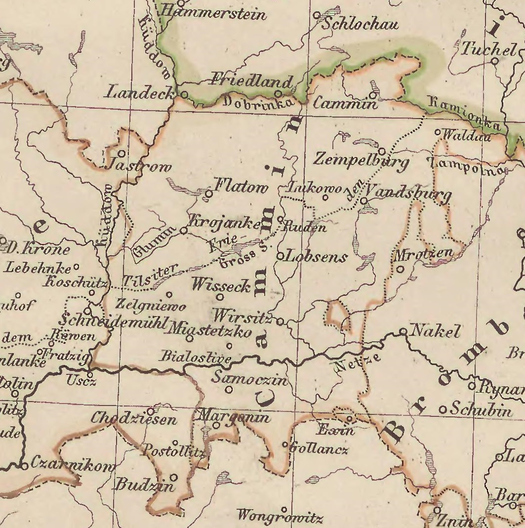 Kreis Kamin (auch Cammin) von 1772 bis 1818